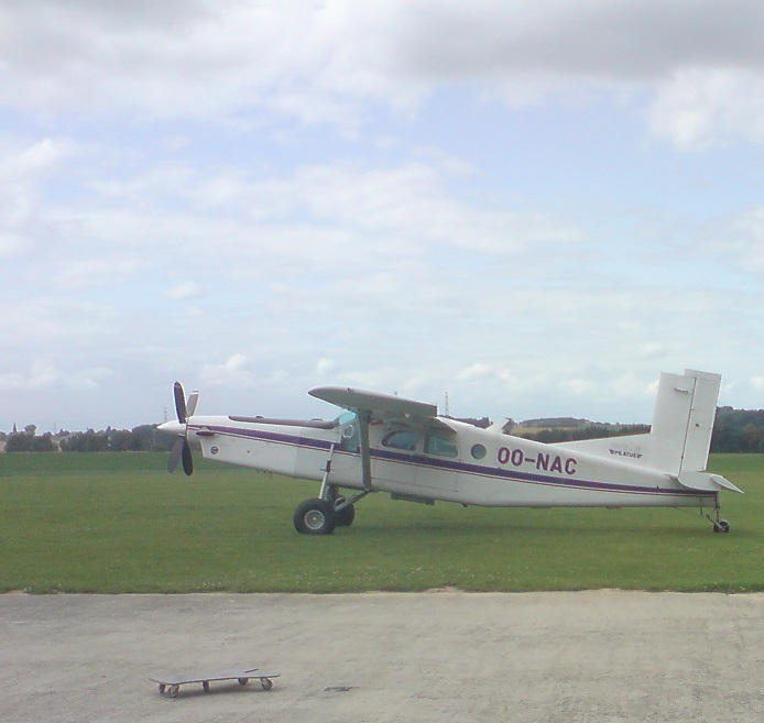 Photo du Pilatus OO-NAC à l'aérodrome de Temploux en 2009.